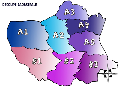 découpe cadastrale du village de Casevecchie